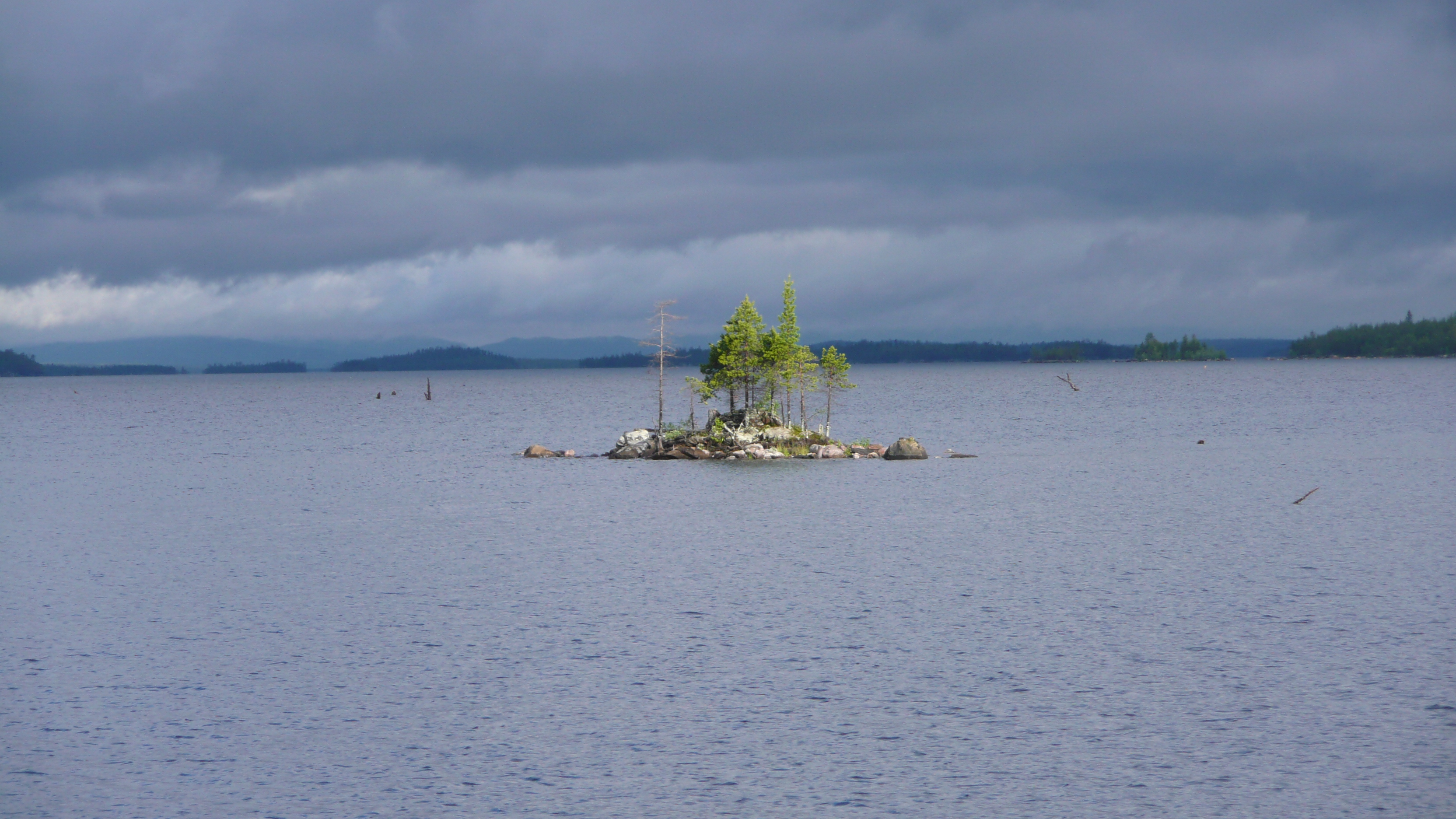 Вид_с_о.Великий